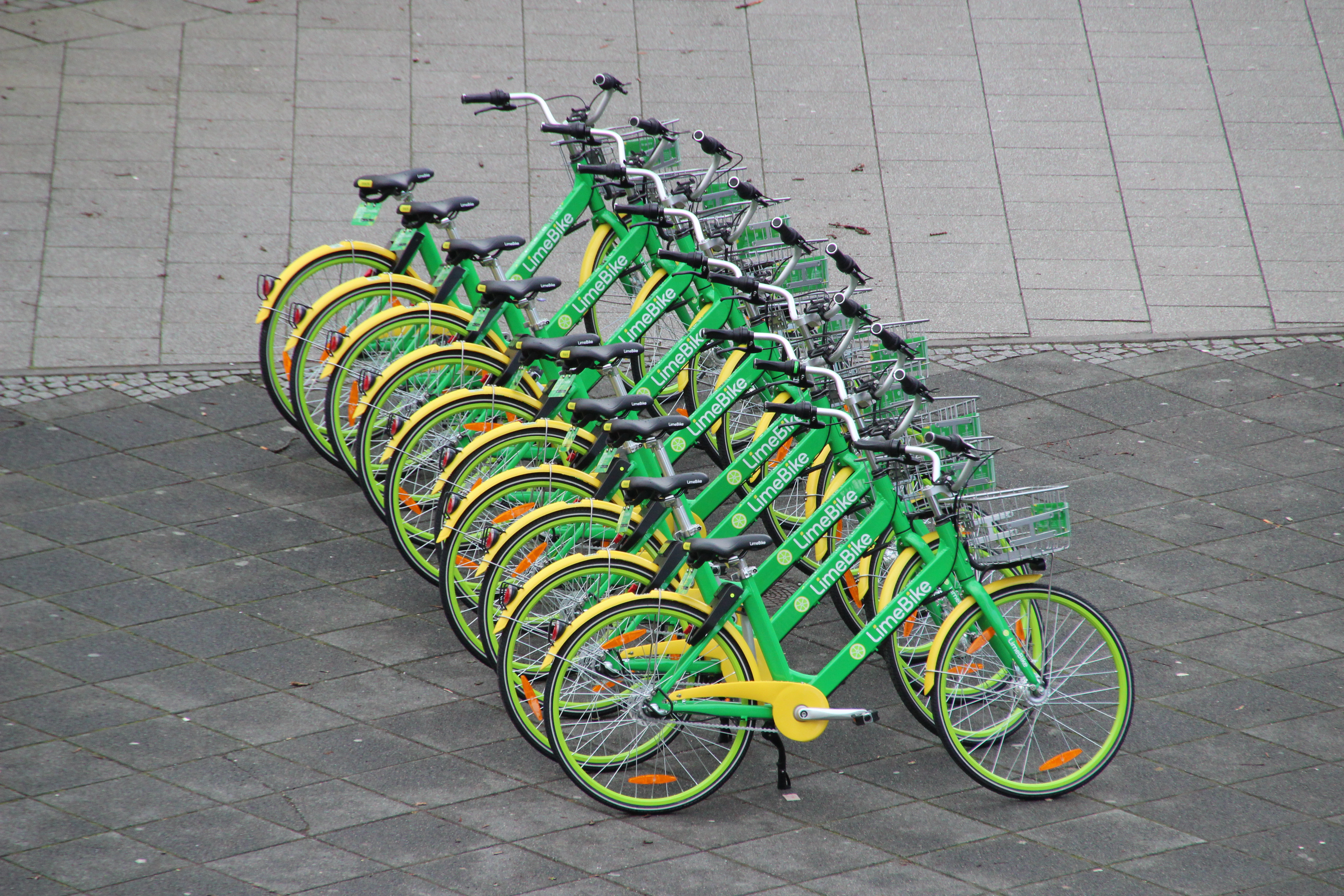 Bildinhalt: Frisch aufgestellte Reihe von Fahrrädern des Systems LimeBike Aufnahmeort: Frankfurt am Main, Deutschland